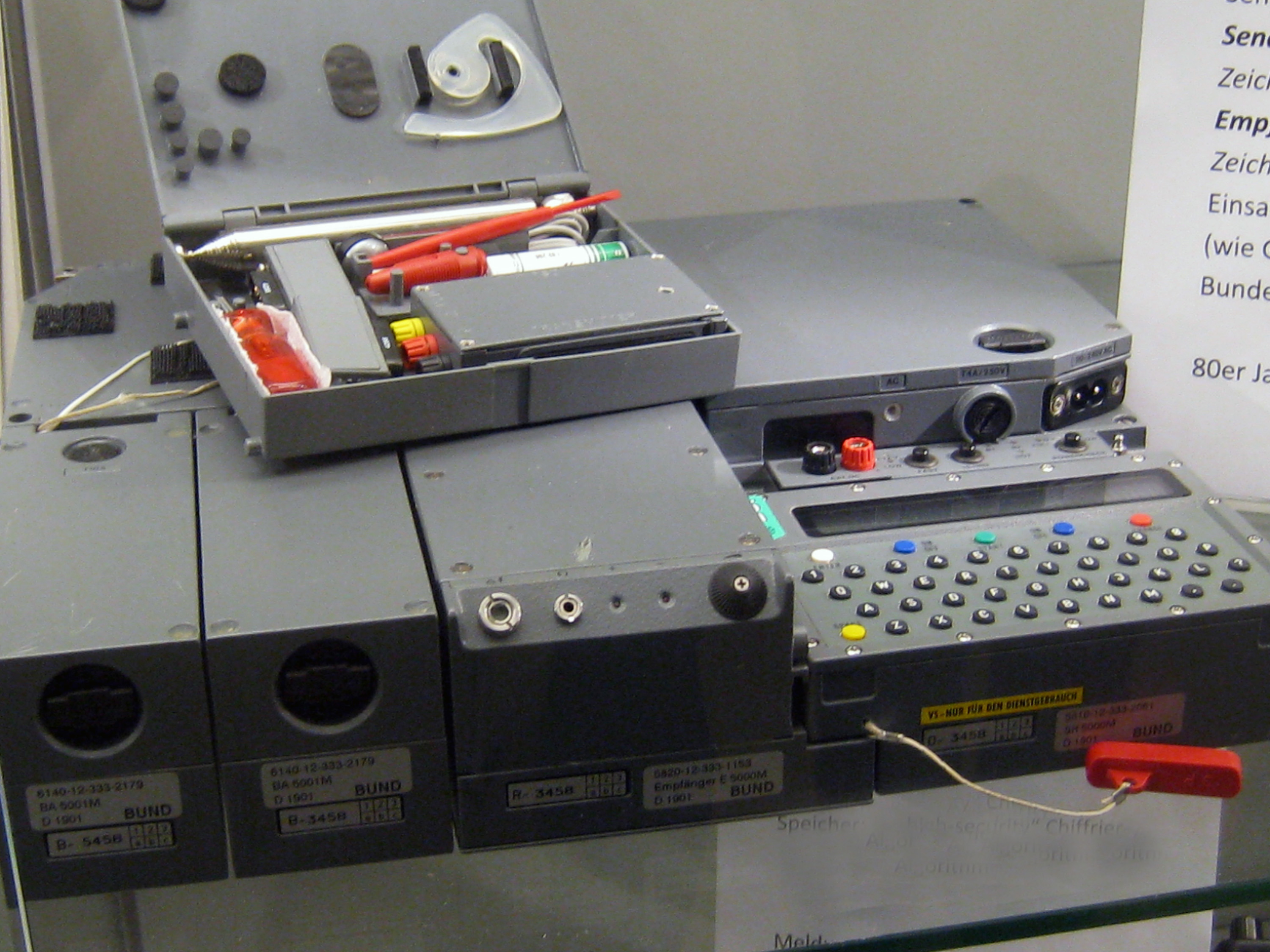 Funkgerät FS-5000 im Festungsmuseum Reuenthal